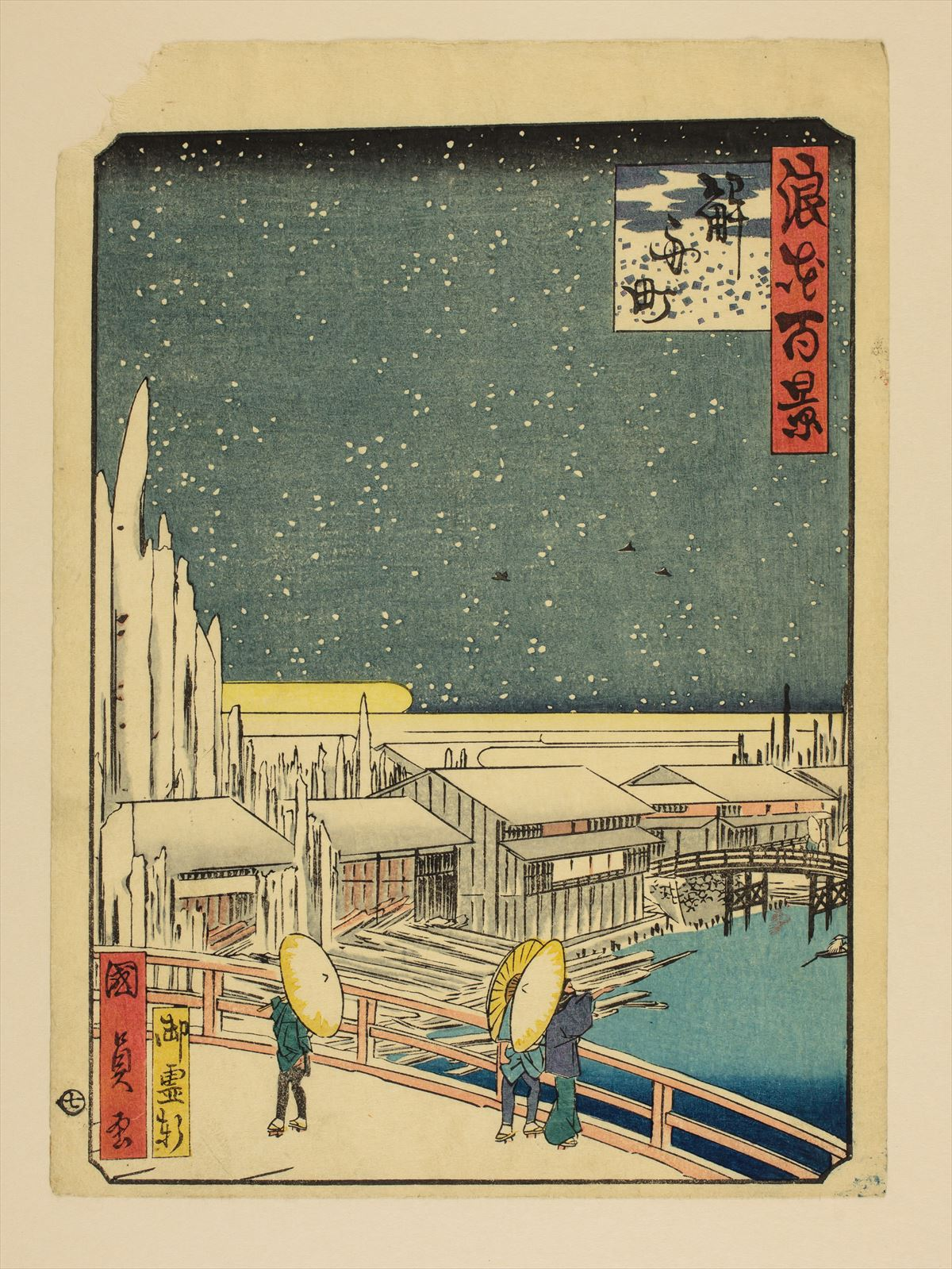 1800年代。歌川國員/画。浪花百景 102枚のうちの1枚。大阪市立中央図書館蔵。